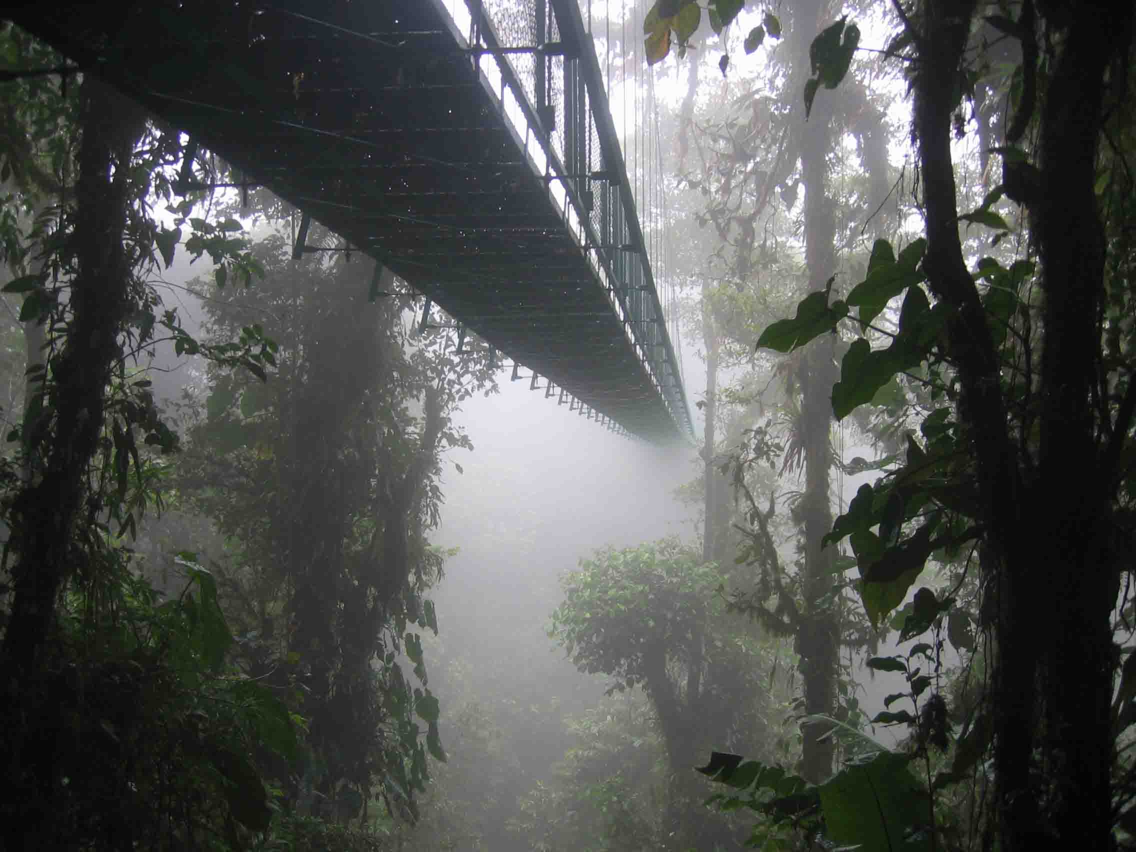 Suspension bridge in Puerto Viejo de Sarapiqui, Costa Rica, 23 January 2004.